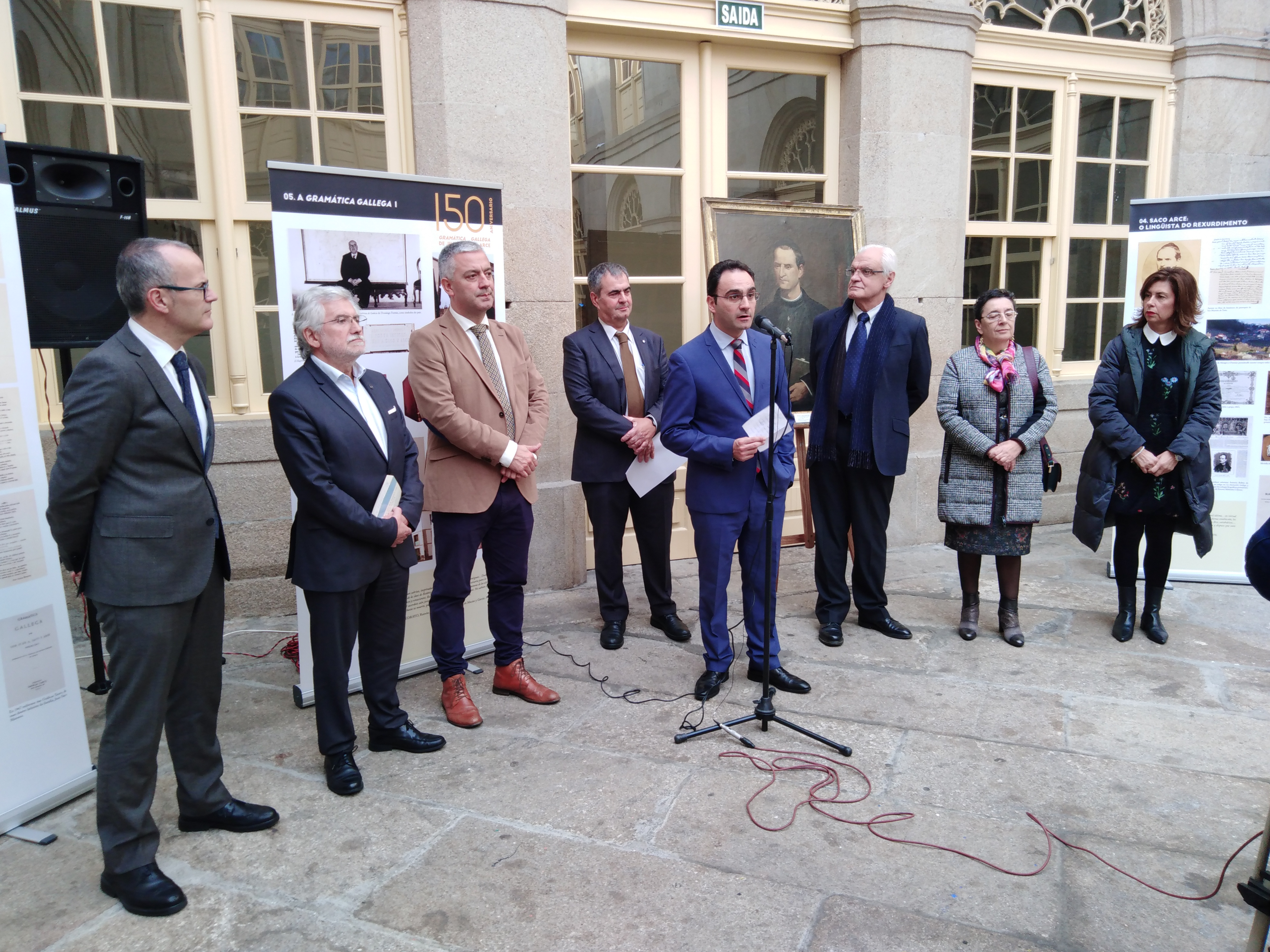 Xesús Vázquez Abad, Rosendo Luís Fernández Fernández, Valentín García Gómez, Afonso Vázquez-Monxardín, Daniel Lorenzo Valdivieso, Víctor Freixanes, Rosario Álvarez e Marisol Dias Mouteira no IES Otero Pedrayo de Ourense, na inauguración da exposición do 150 aniversario da Gramática Gallega de Juan Antonio Saco Arce